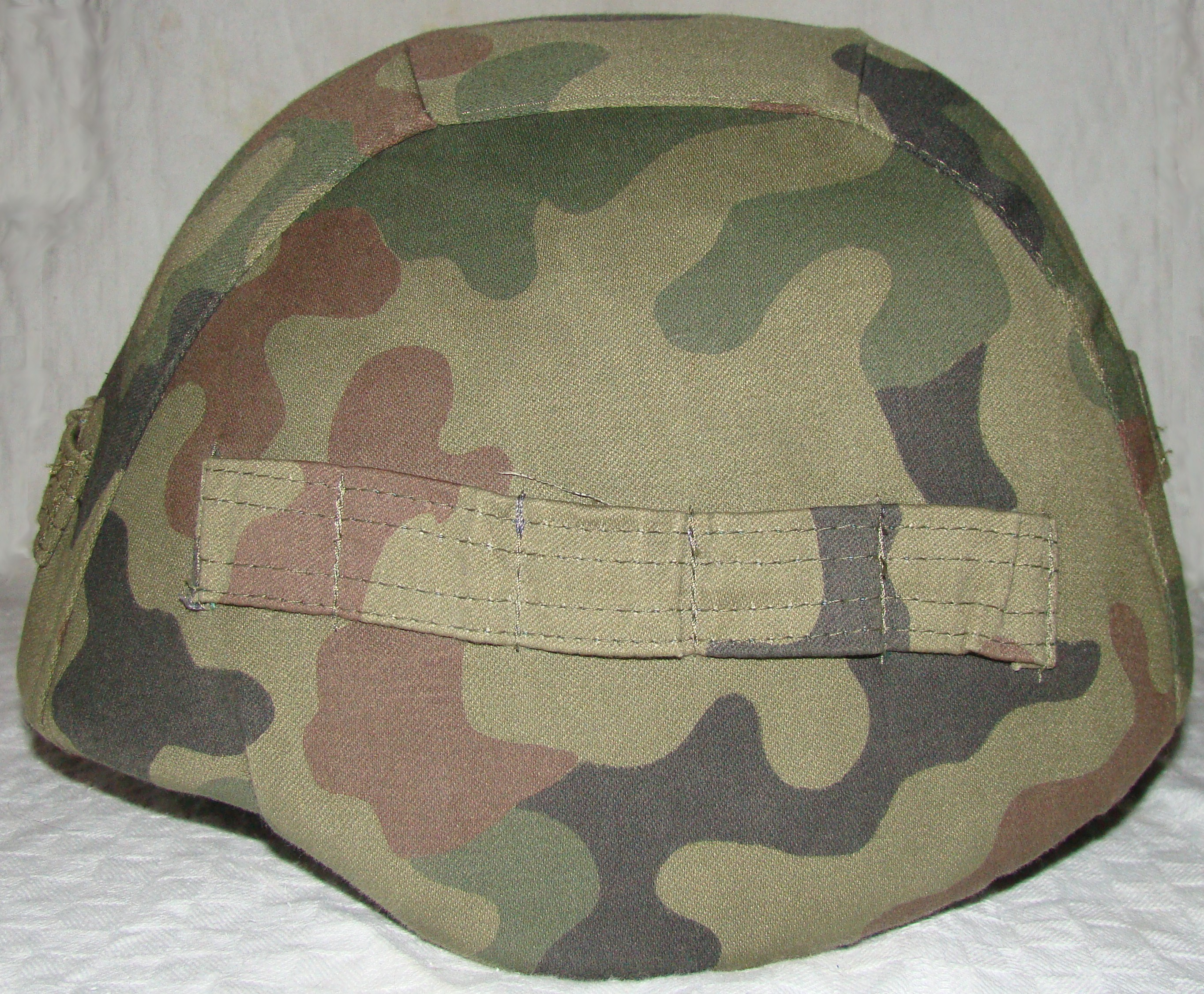 Hełm wz.93 w pokrowcu maskującym